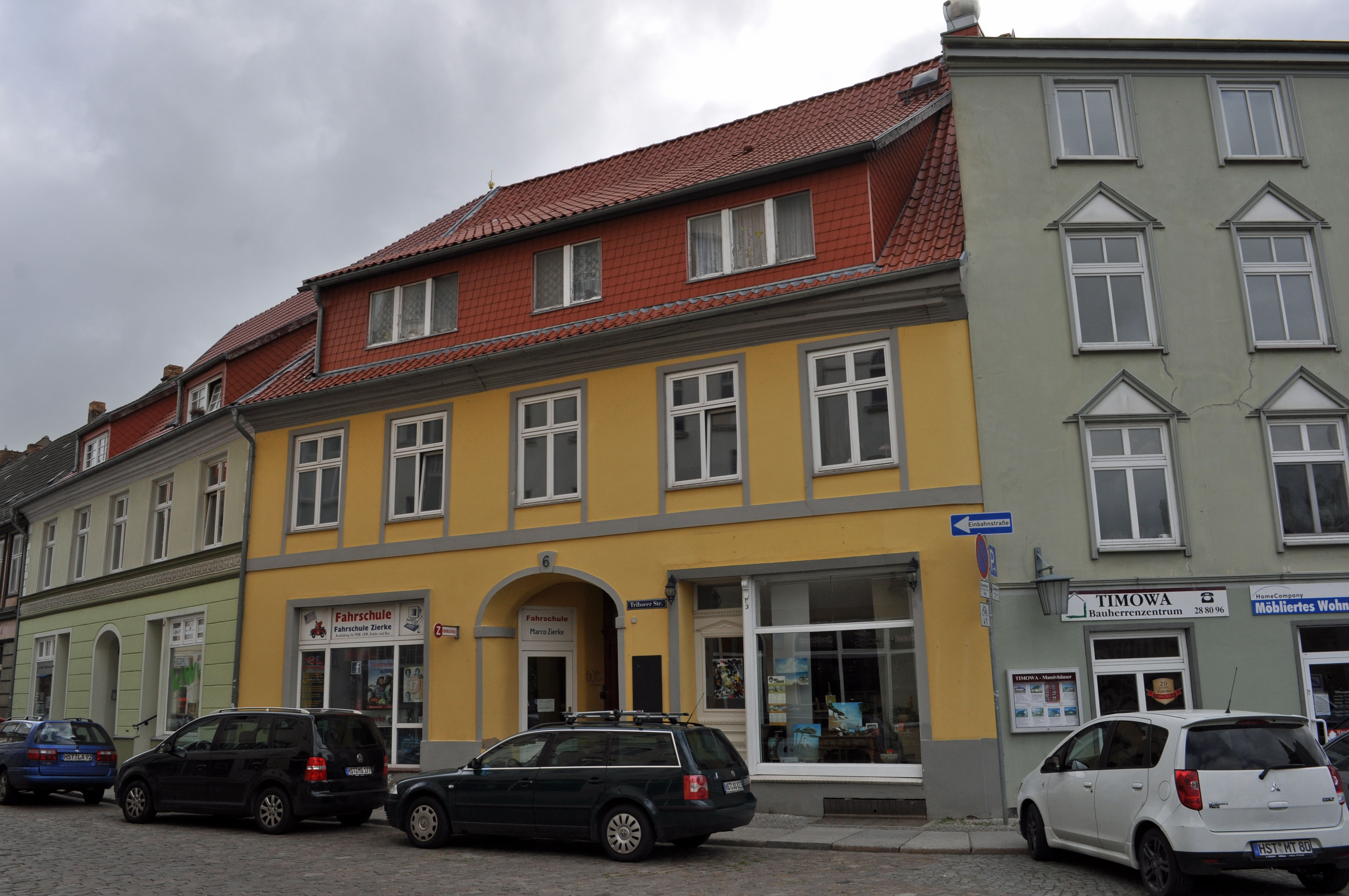 Gebäude in Stralsund, siehe Dateiname